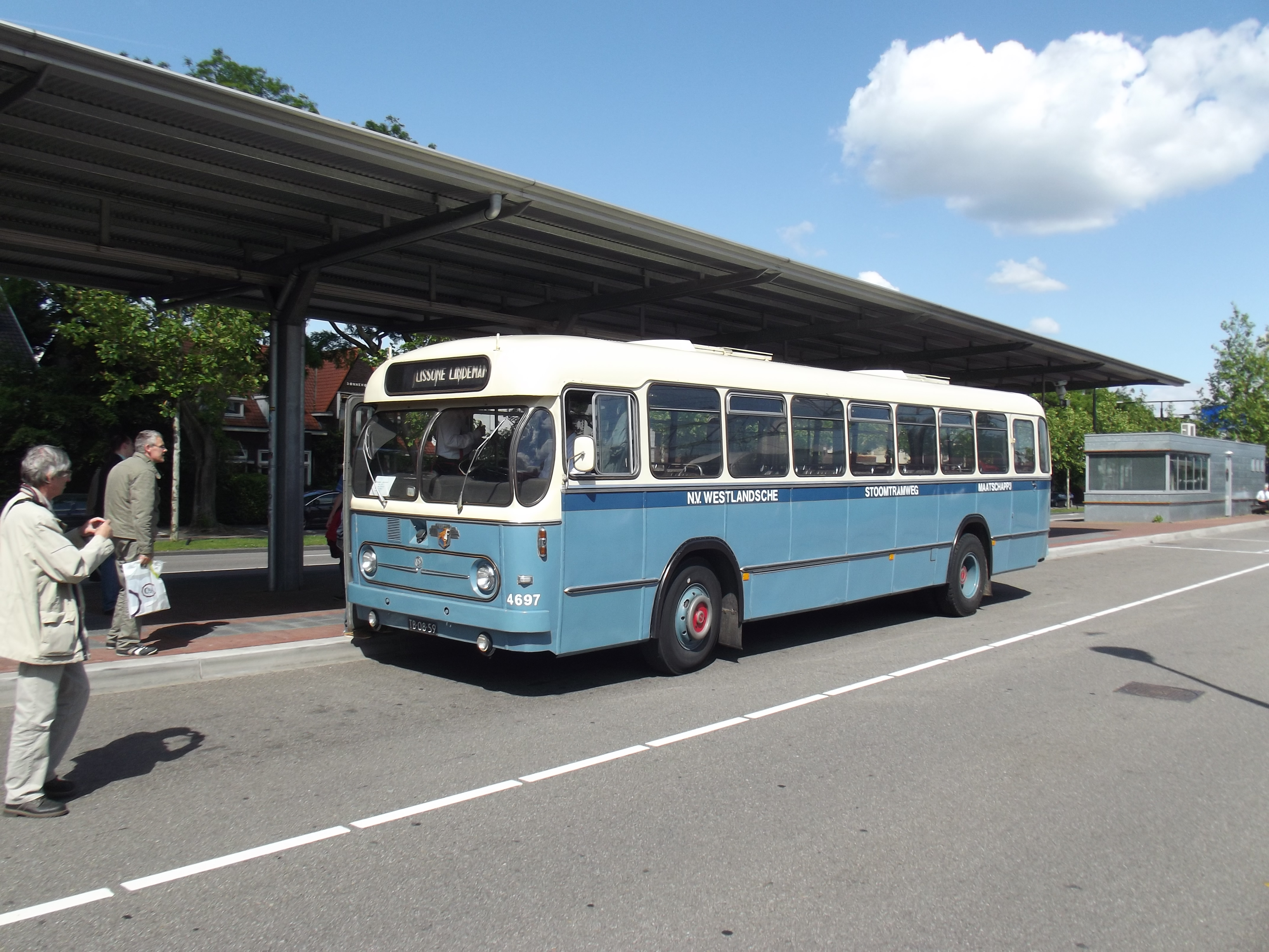 Vroegere Westlandsche Stoomtrammaatchappij bij Dordt in stoom bij het busstation van Dordrecht.